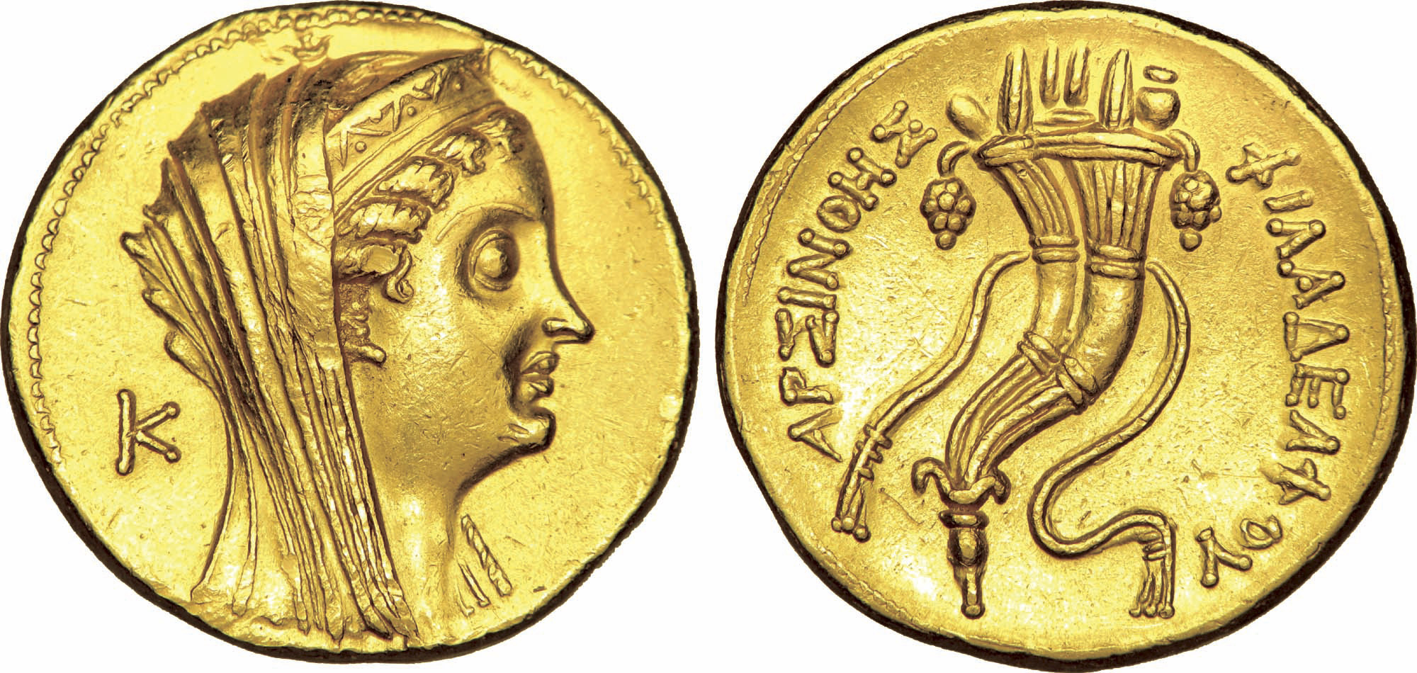 Nom de l'atelier : Égypte, Alexandrie Métal : or Diamètre : 28mm Axe des coins : 11h. Poids : 27,82g. Titulature avers : Κ (kappa) derrière la tête. Description avers : Buste diadémé et voilé d’Arsinoé II à droite, une fleur de lotus à la pointe de la tête. Description revers : Double corne d’abondance, remplie de fruits, une grappe de raisin suspendue de chaque côté, les bandelettes flottant au vent. Légende revers : ΑΡΣΙΝΟΗΣ - ΦΙΛΑΔΕΛΦΟΥ Traduction revers : (Arsinoé sœur de).